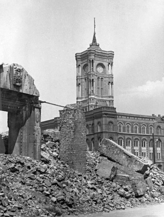 Berlin, Rotes Rathaus, Ruine Zentralbild Greiser 29 Mot. 25.5.1954 Berlin im Mai 1954 UBz: Auferstanden aus Ruinen. (Das rote Rathaus)